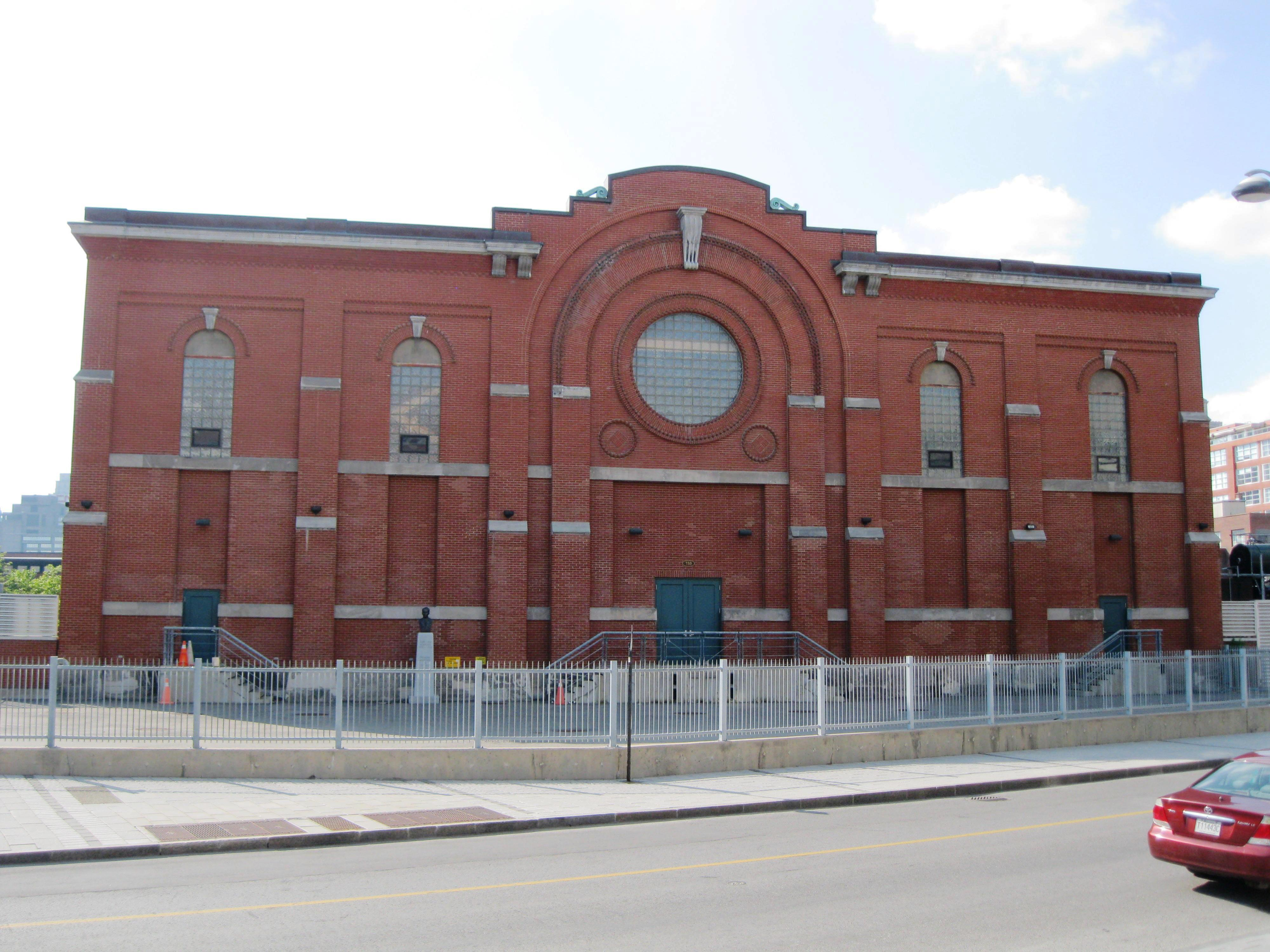 Poste Adélard-Godbout (autre noms connus: Royal Electric Co., Poste de transformation Wellington), 733, rue Wellington/Queen, Montréal, Québec, Canada